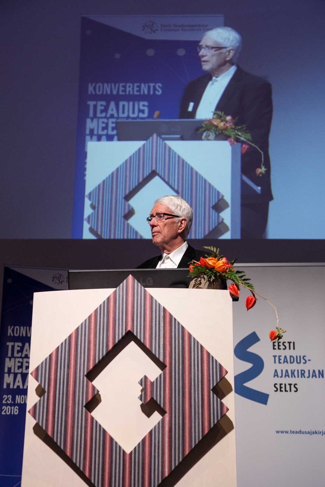 Enn Tõugu 2016. aasta teaduskommunikatsiooni konverentsil.